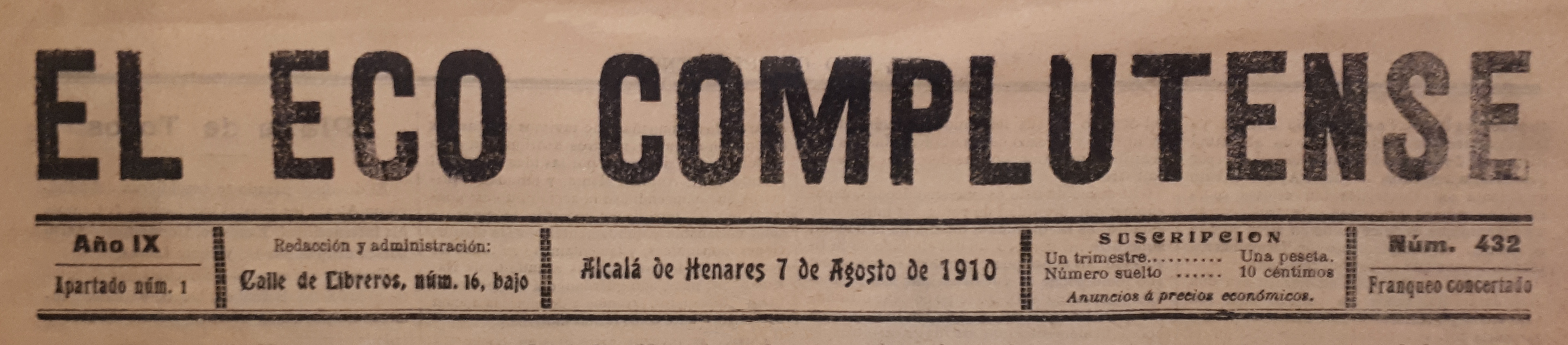 Cabecera del periódico "El Eco Complutense", publicado en Alcalá de Henares (Comunidad de Madrid - España) entre el 14 de abril de 1902 y el 14 de agosto de 1910 (433 números en total). Su redacción y sede administrativa se localizaba en la calle Libreros, nº 16.